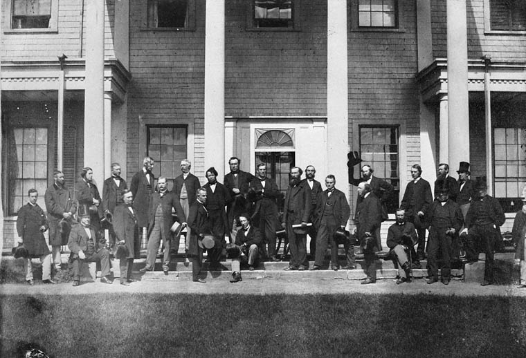 Source : Bibliothèque et Archives Canada